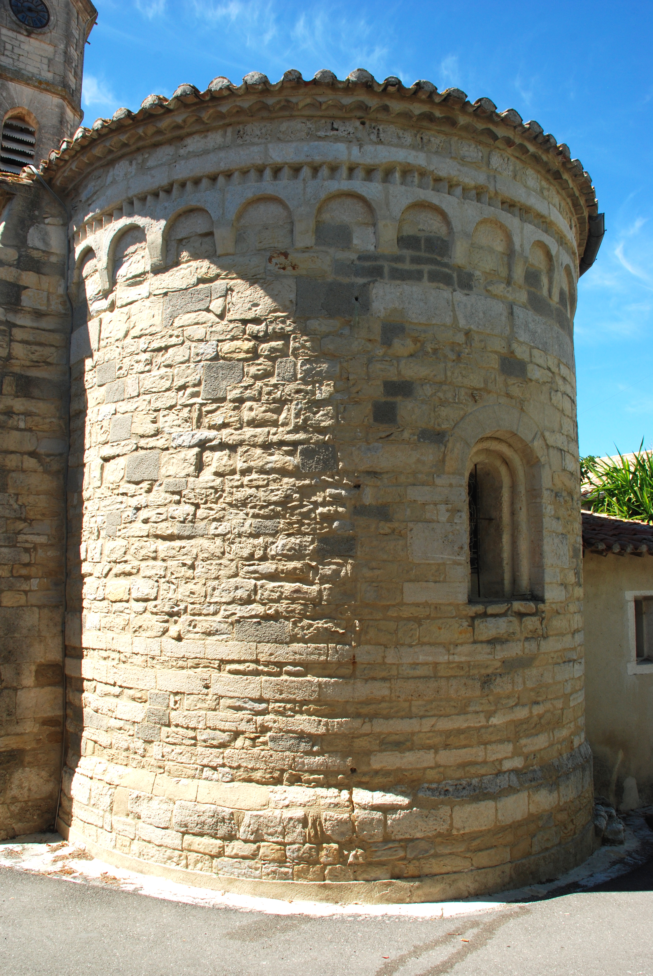 France - Hérault - Église de Saint-Hilaire-de-Beauvoir